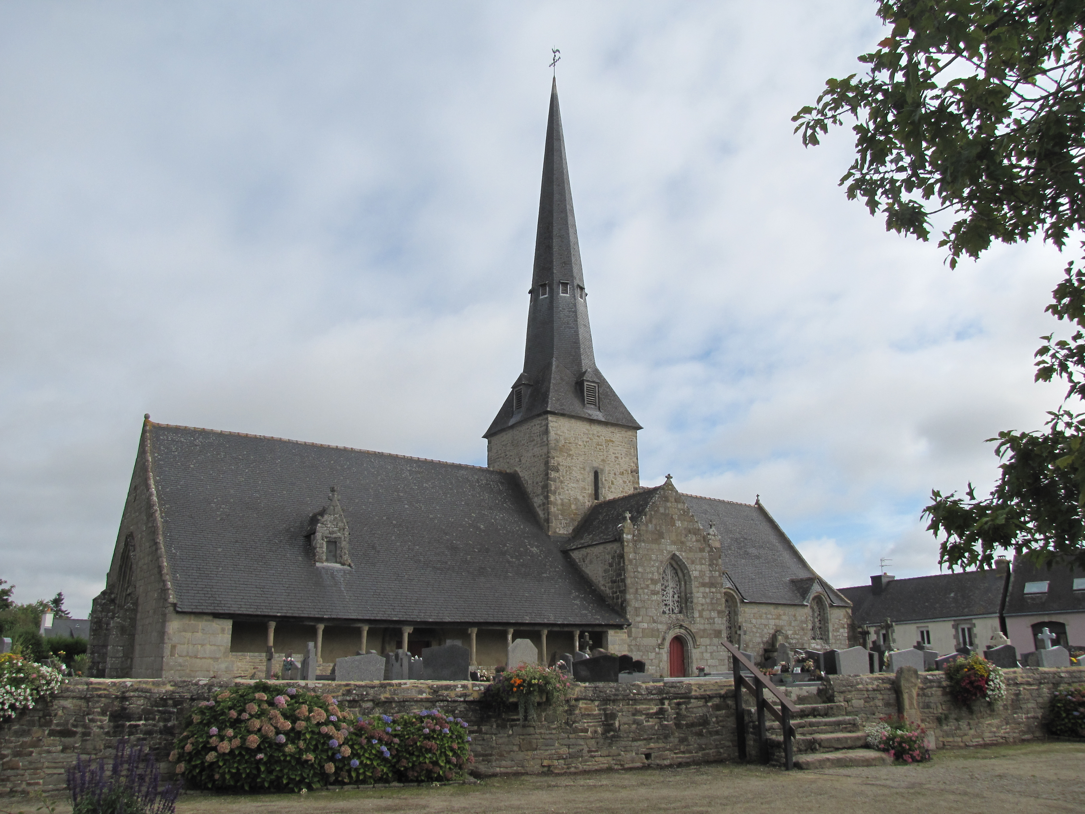 Église de la Trinité de Calan .